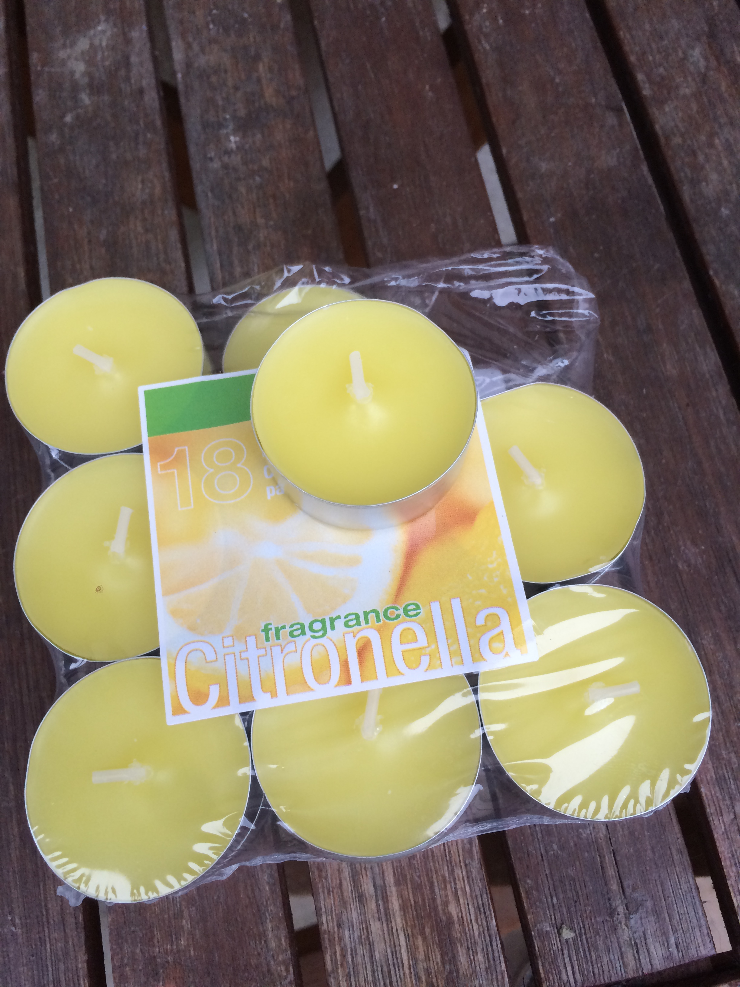 Citronella Kerzen